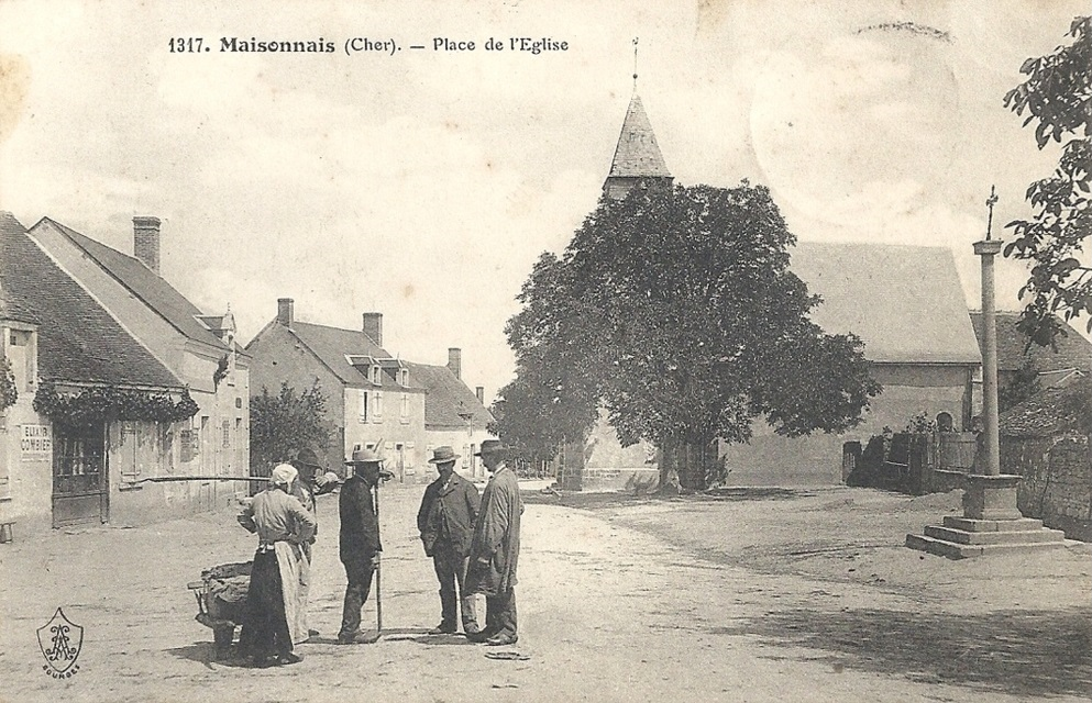 Carte postaleː Maisonnais (Cher) Place de l'Eglise